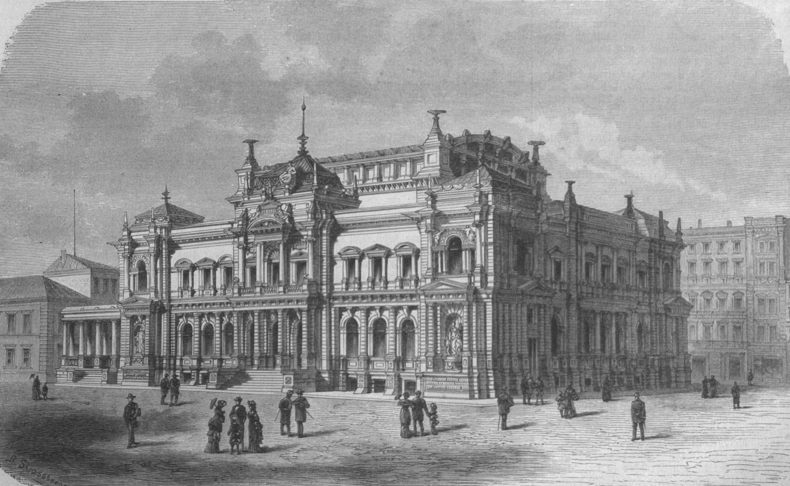 Skizze der Neuen Börse am Tröndlinring in Leipzig (kriegszerstört)